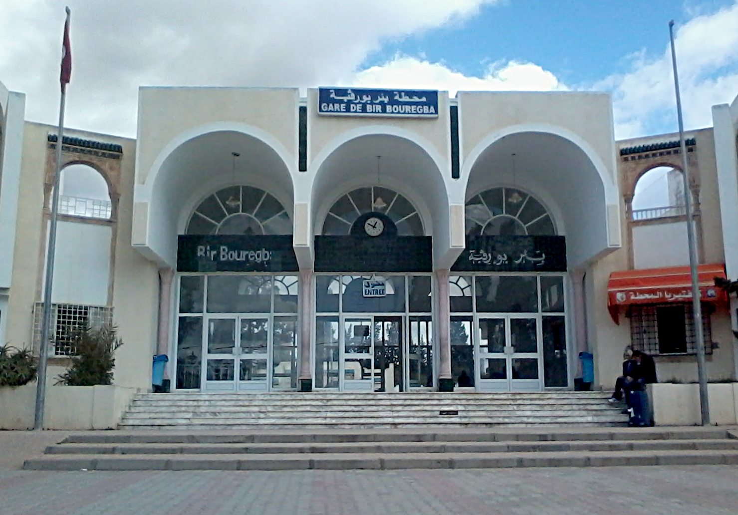 Gare Bir bouragba